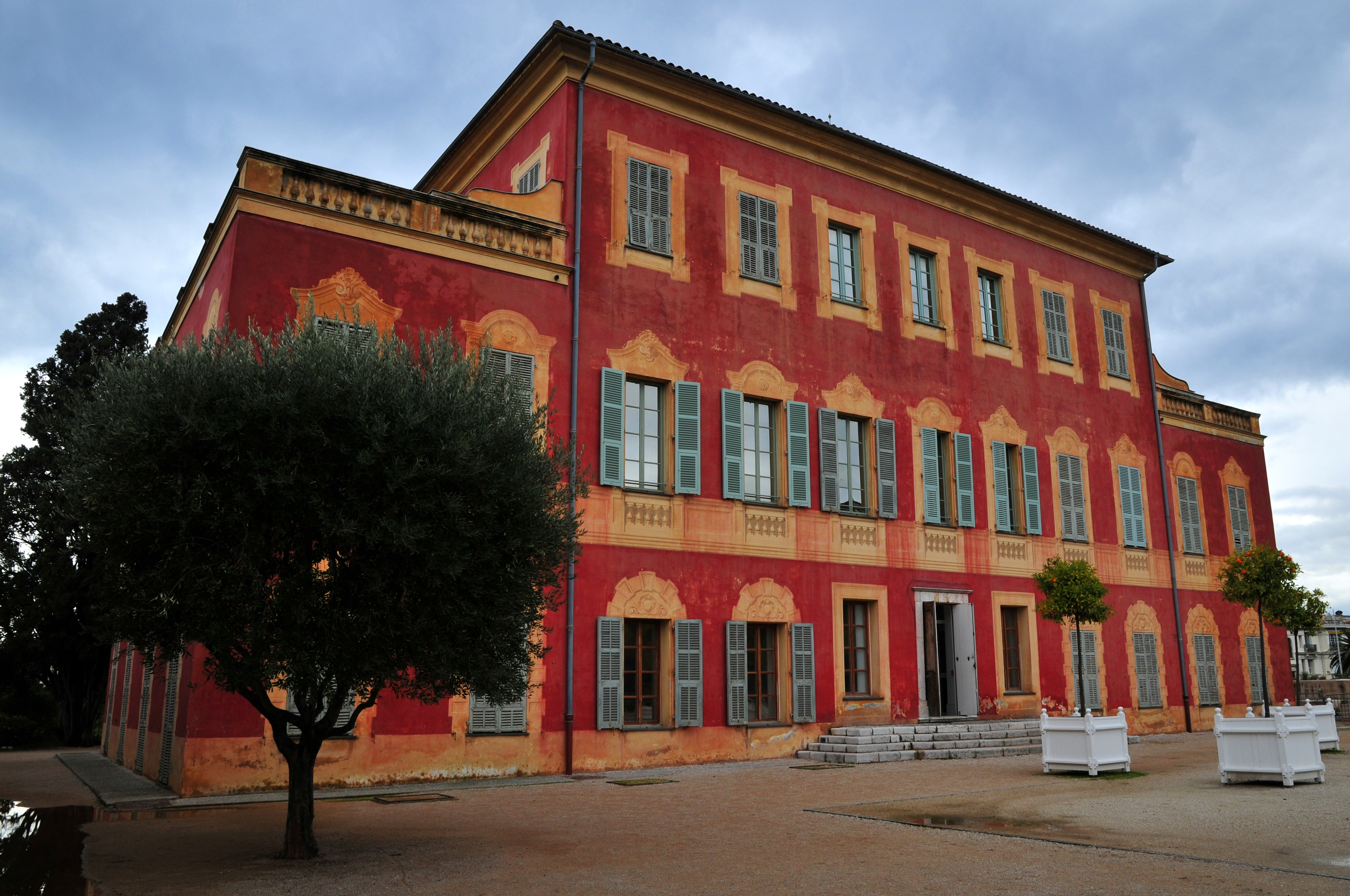 Front of musée Matisse in Nice, France.